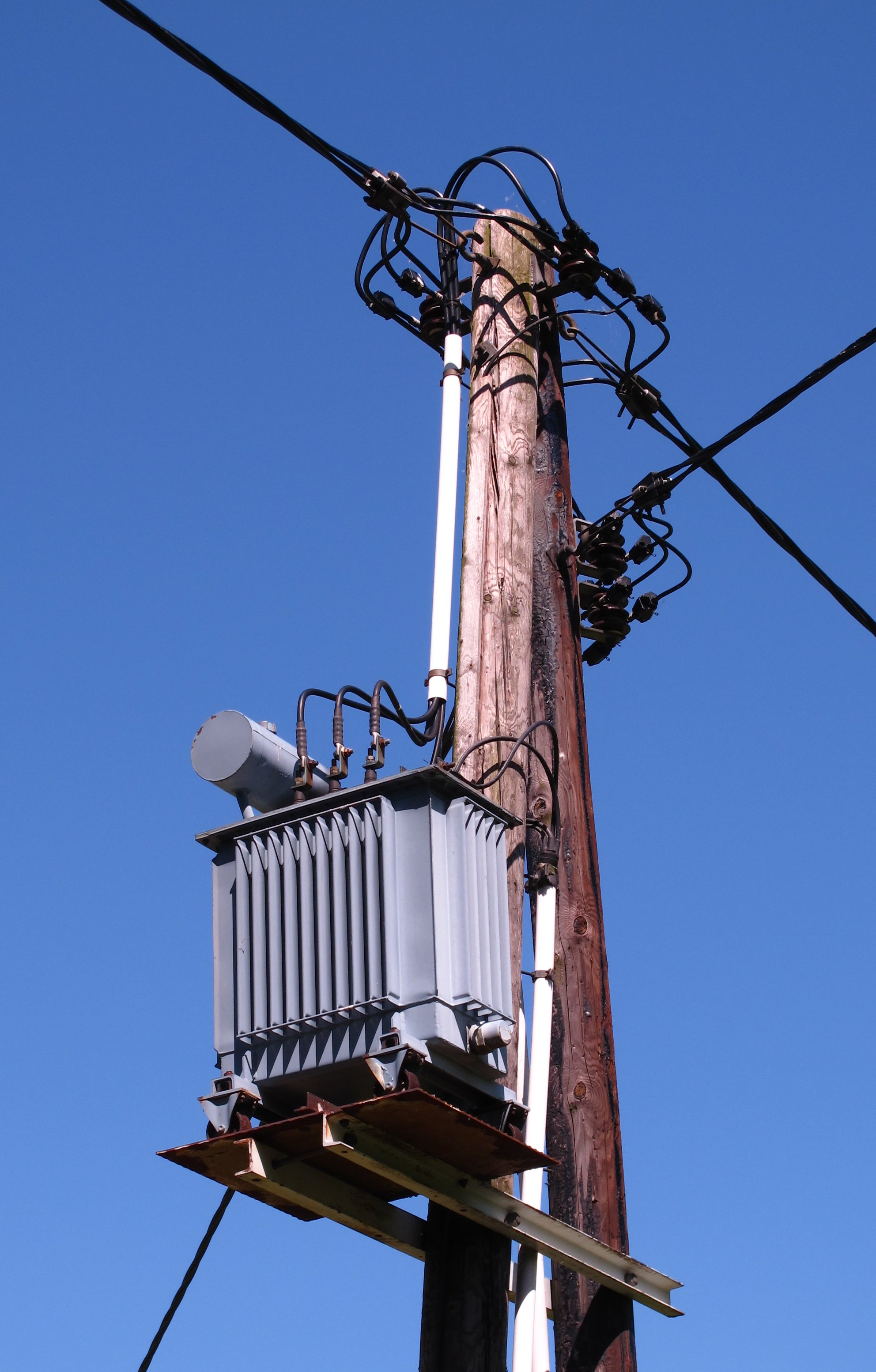 Masttransformator welcher zwischen zwei Niederspannungsebenen (960 V auf 400 V) transformiert